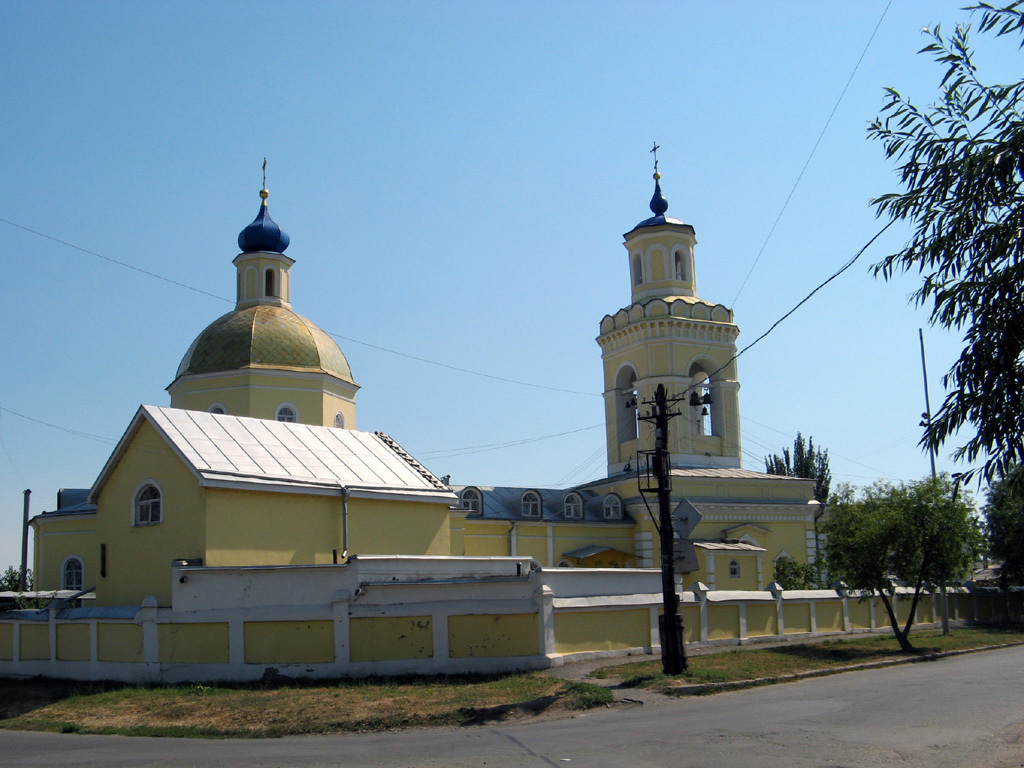 Церковь Николая Чудотворца (Свято-Никольский храм) в Таганроге